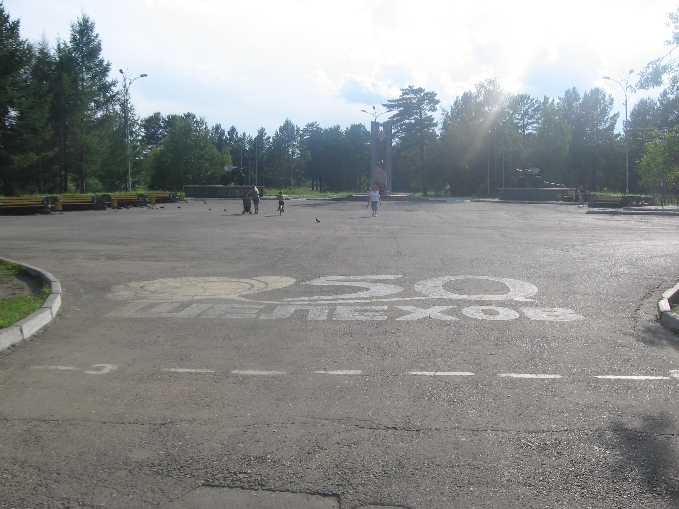 Лето в Шелехове